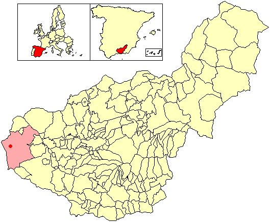 Situación de la localidad de Cuesta Blanca (en el municipio de Loja) respecto a la provincia de Granada, en España.